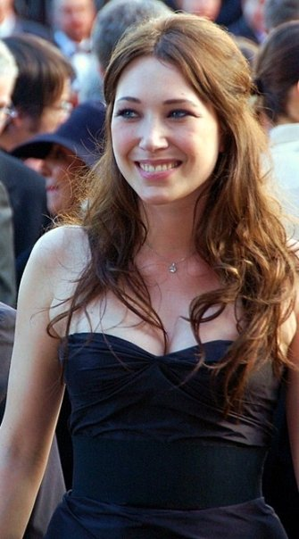 Laura Smet au festival de Cannes.